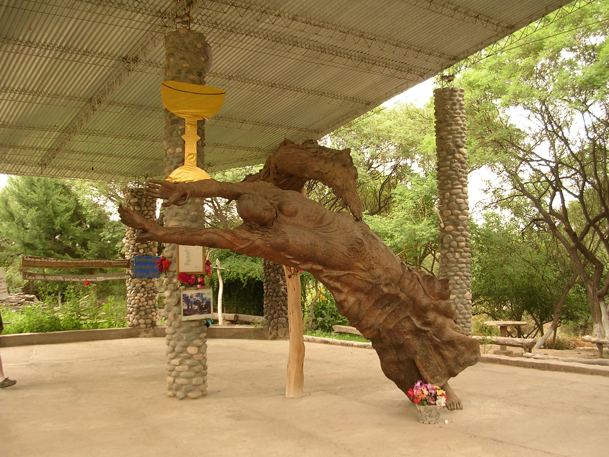 Virgen tallada en Amaicha del Valle (Argentina)